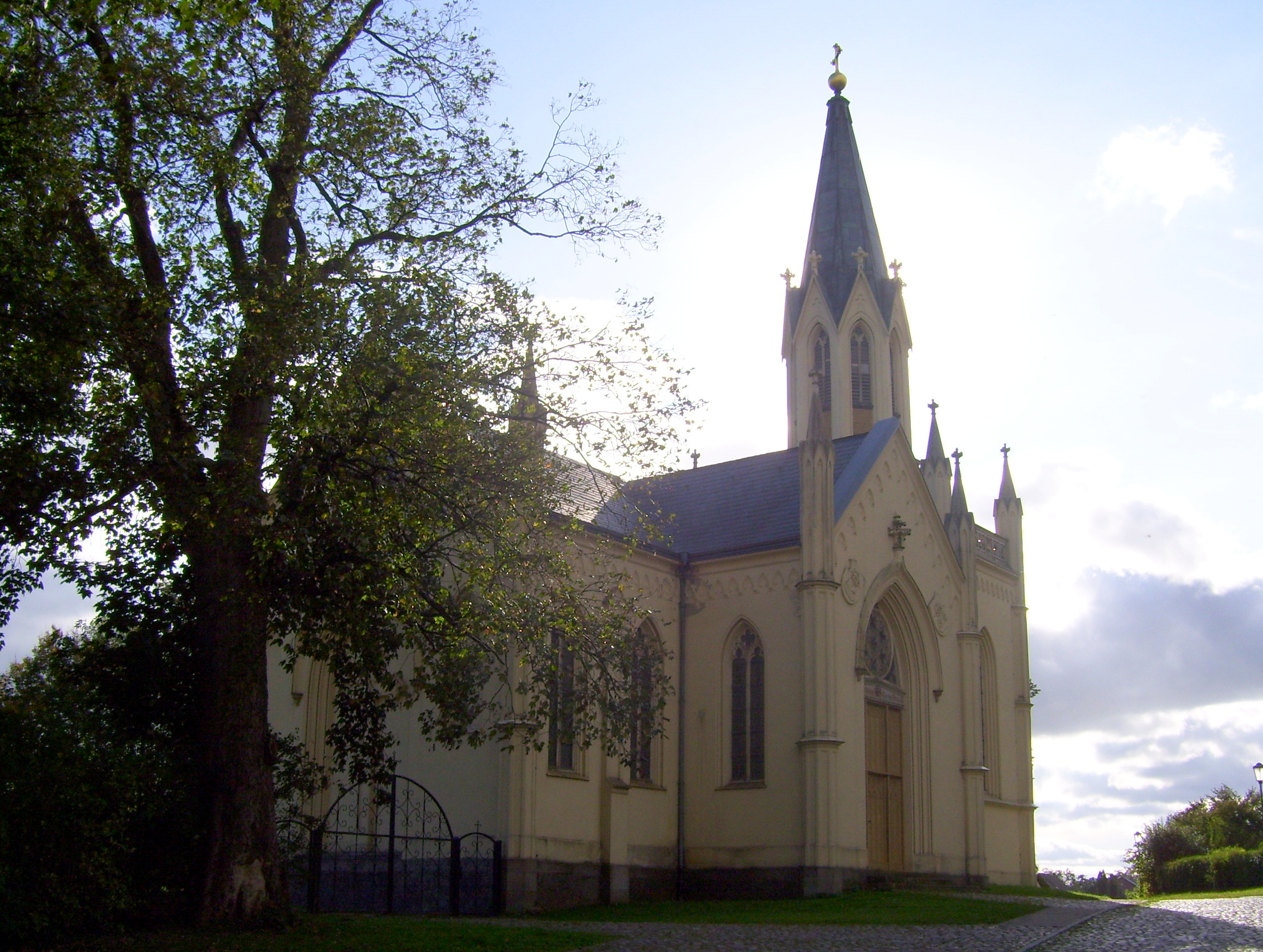 Kirche in Wolfshagen (Uckermark), Ansicht von Nordosten (Gegenlicht)